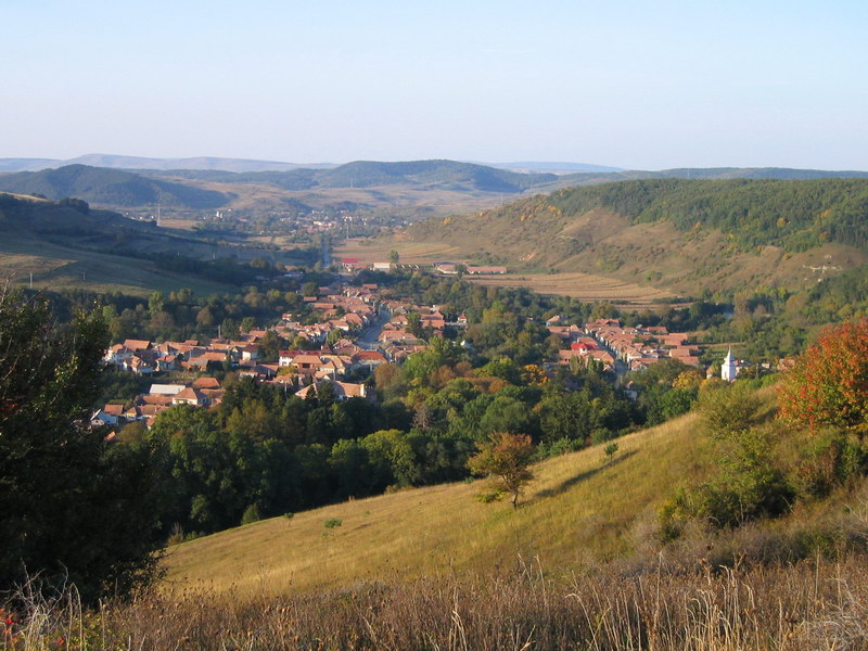 Săvădisla commune in Cluj County, Romania